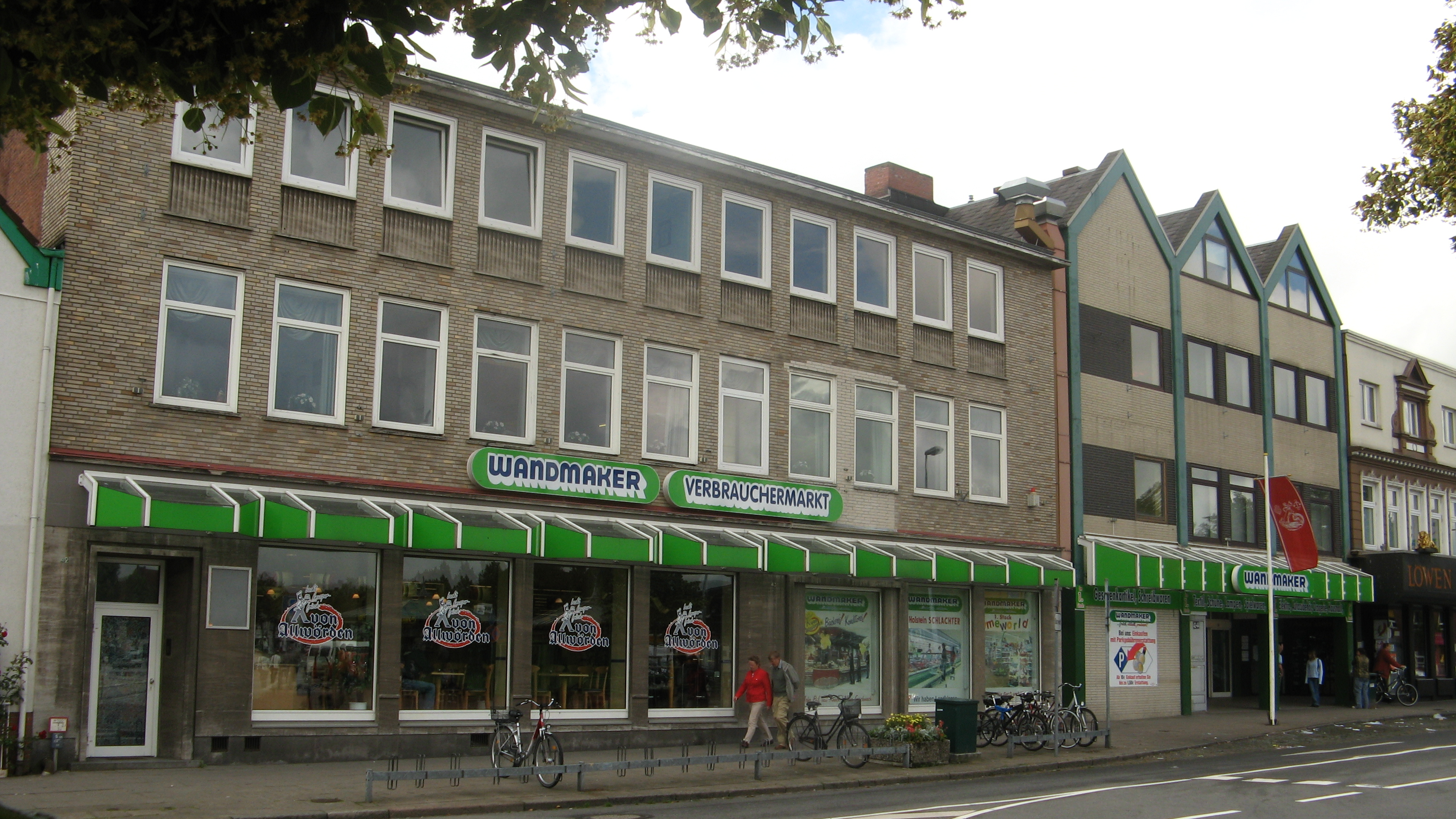 wandmaker store